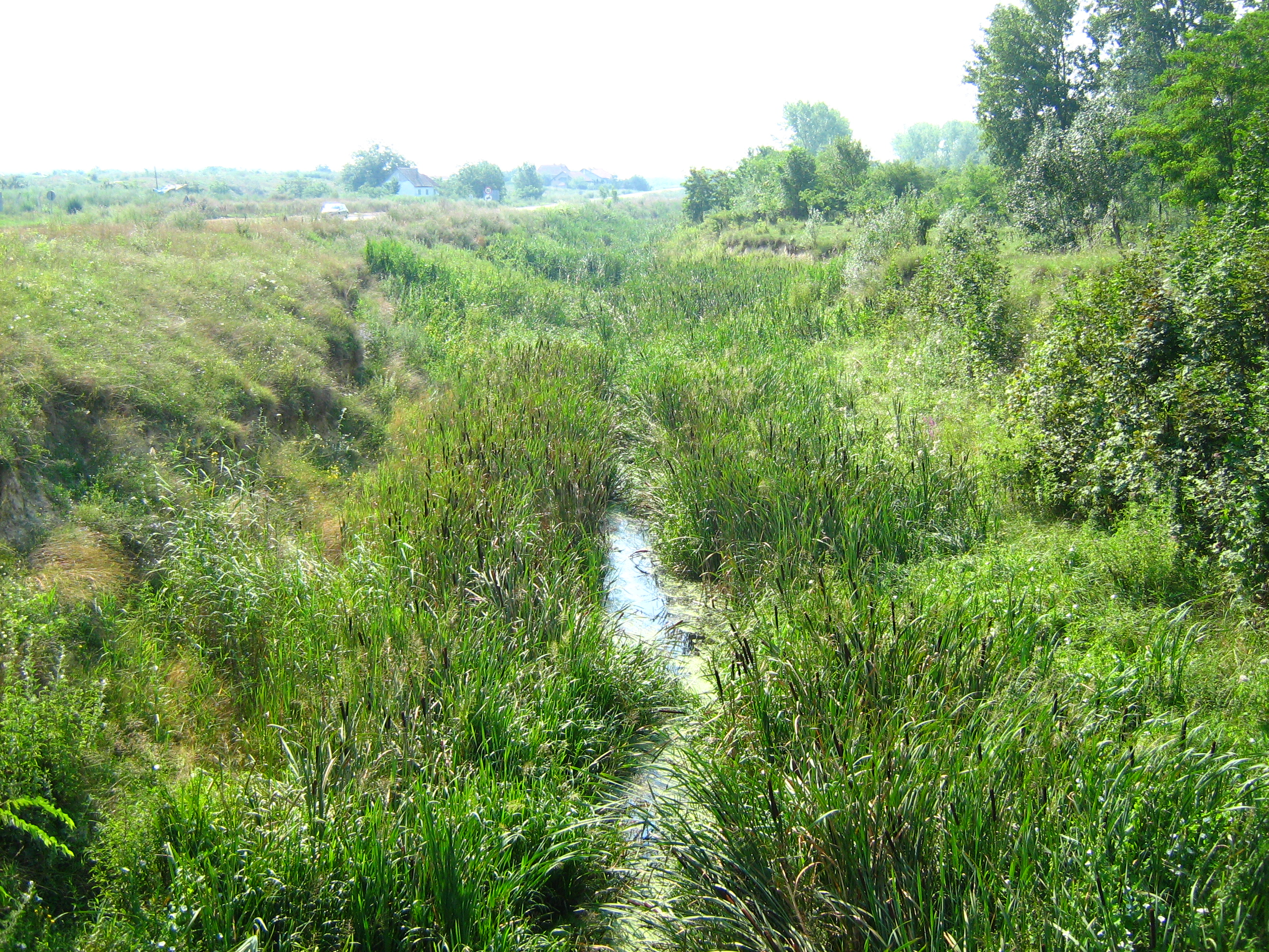 Аутор: Пајкмен